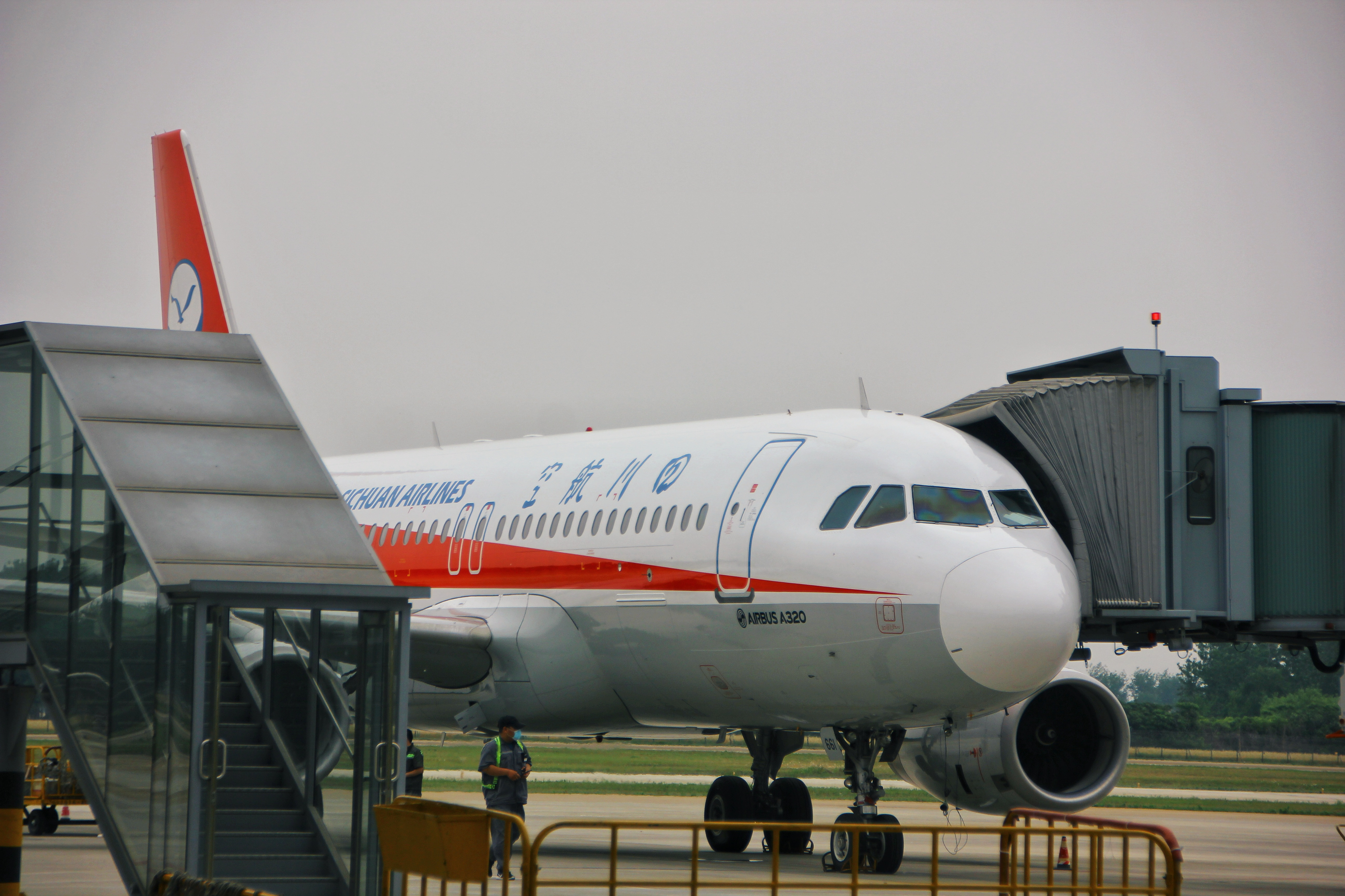 中文（中国大陆）: 四川航空A320停靠在徐州观音机场